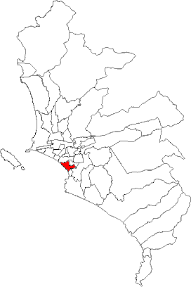 made by User:StarbucksFreak